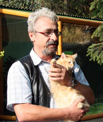 Vyškov